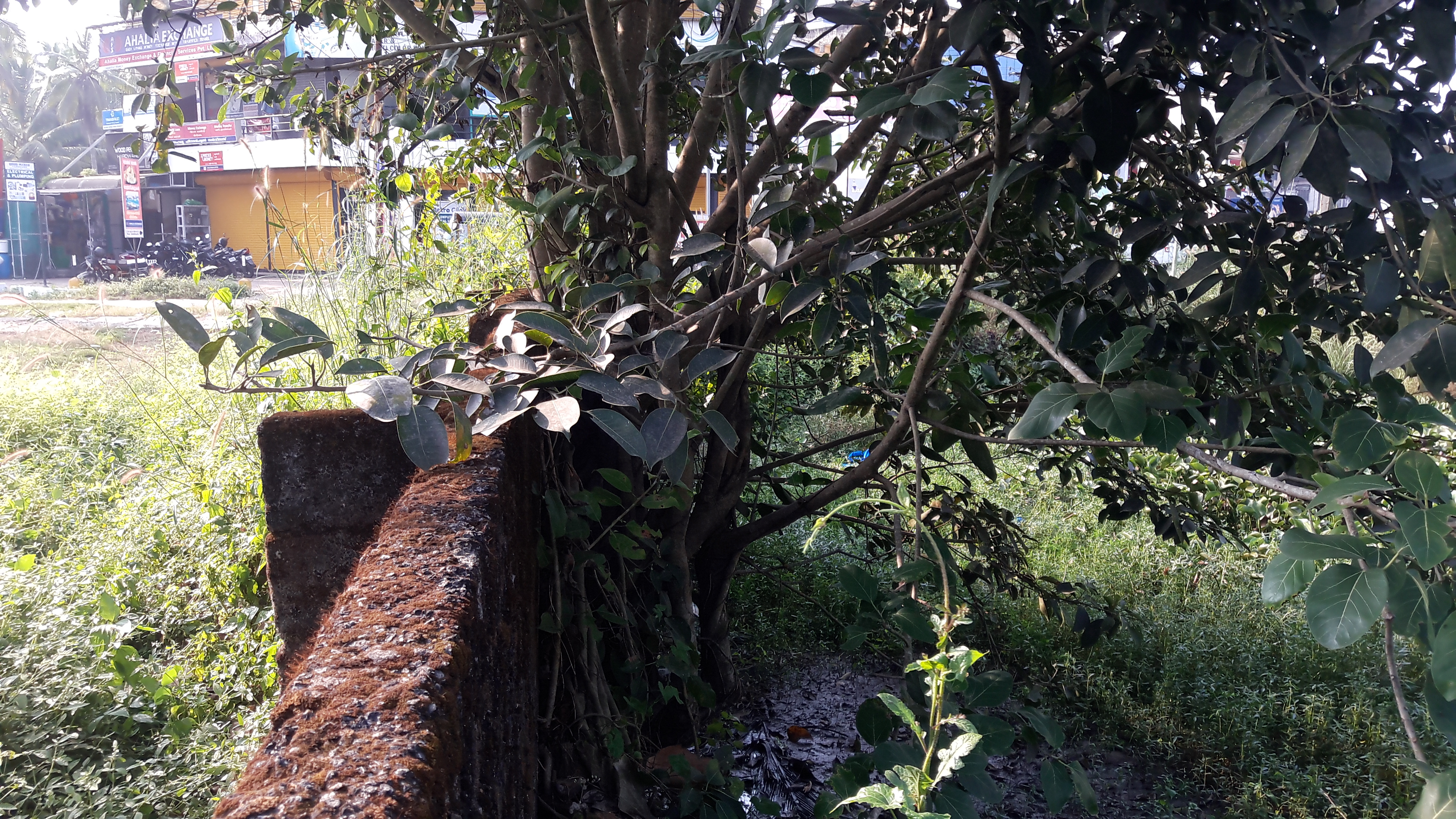 തൃശൂര്‍ ജില്ലയിലെ ചാവക്കാട് താലൂക്കില്‍ നഗരമധ്യത്തില്‍ ഒരു മതില്‍ പറ്റി ഒരുമ്മിച്ച് വളരുന്ന ഒരു കൊയലി മരവും പേരാല്‍ മരവും.